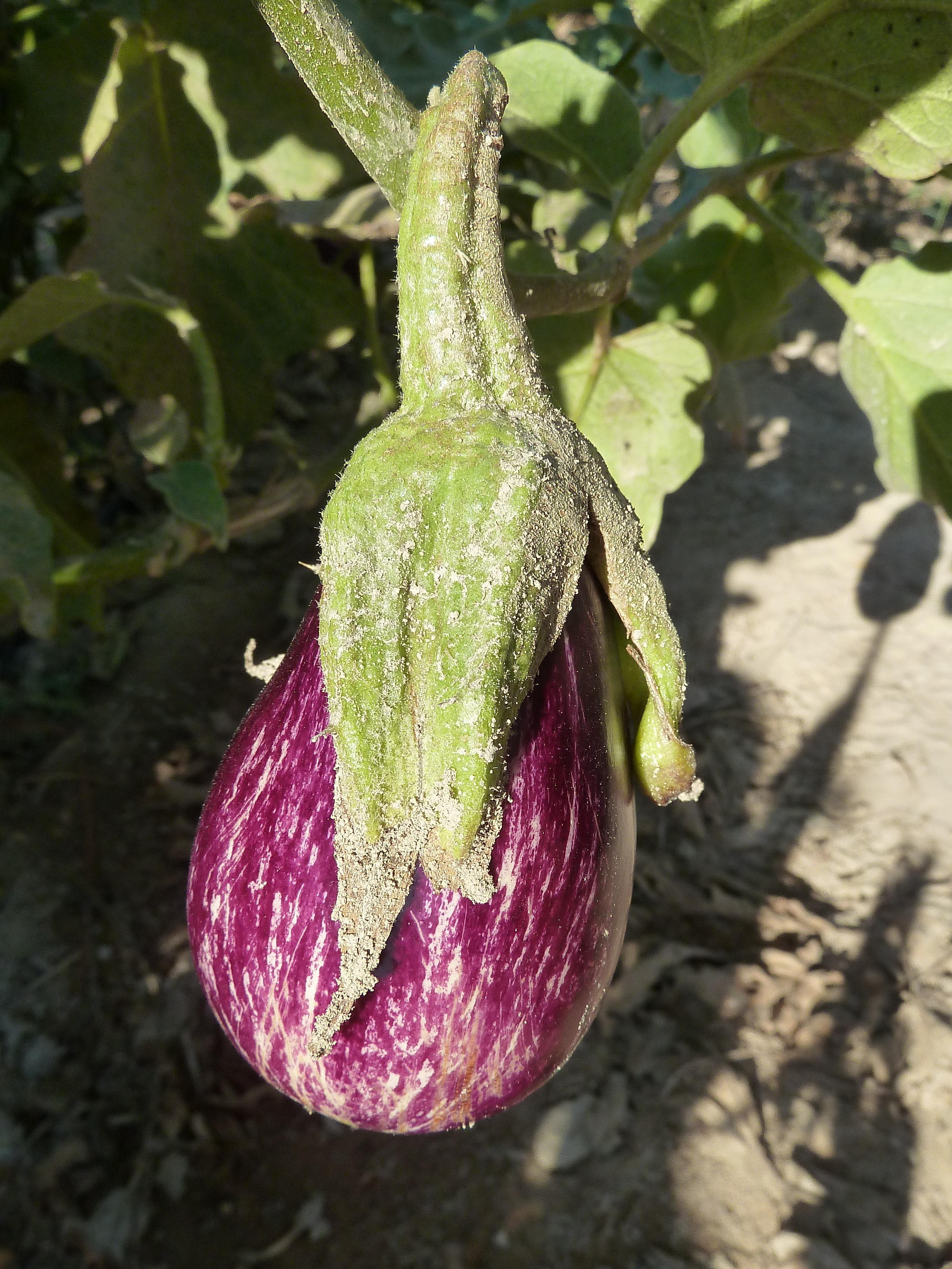 Solanum melongena (Berenjena) : Fruto de una variedad bicolor habitual en el Levante Español (var. «Jaspeada de Gandía») - El Canalillo, Albatera (Alicante, España).